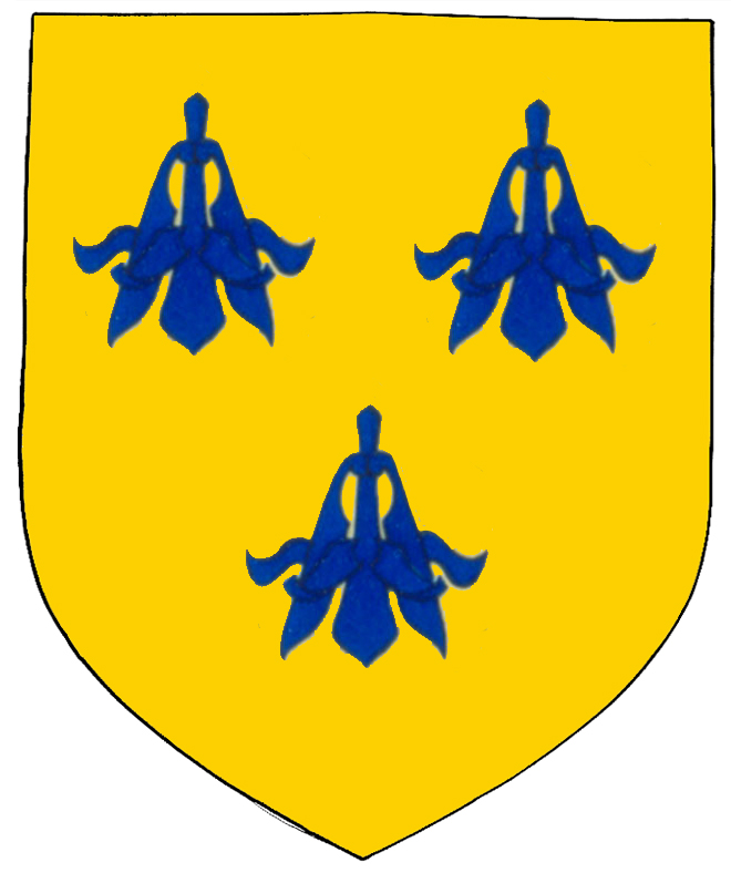 Blason de la seigneurie de Bacouël (Oise) d'après le blasonnement rapporté par l'abbé Seillier (1897) : "d'or à trois ancolies d'azur, 2 et 1".